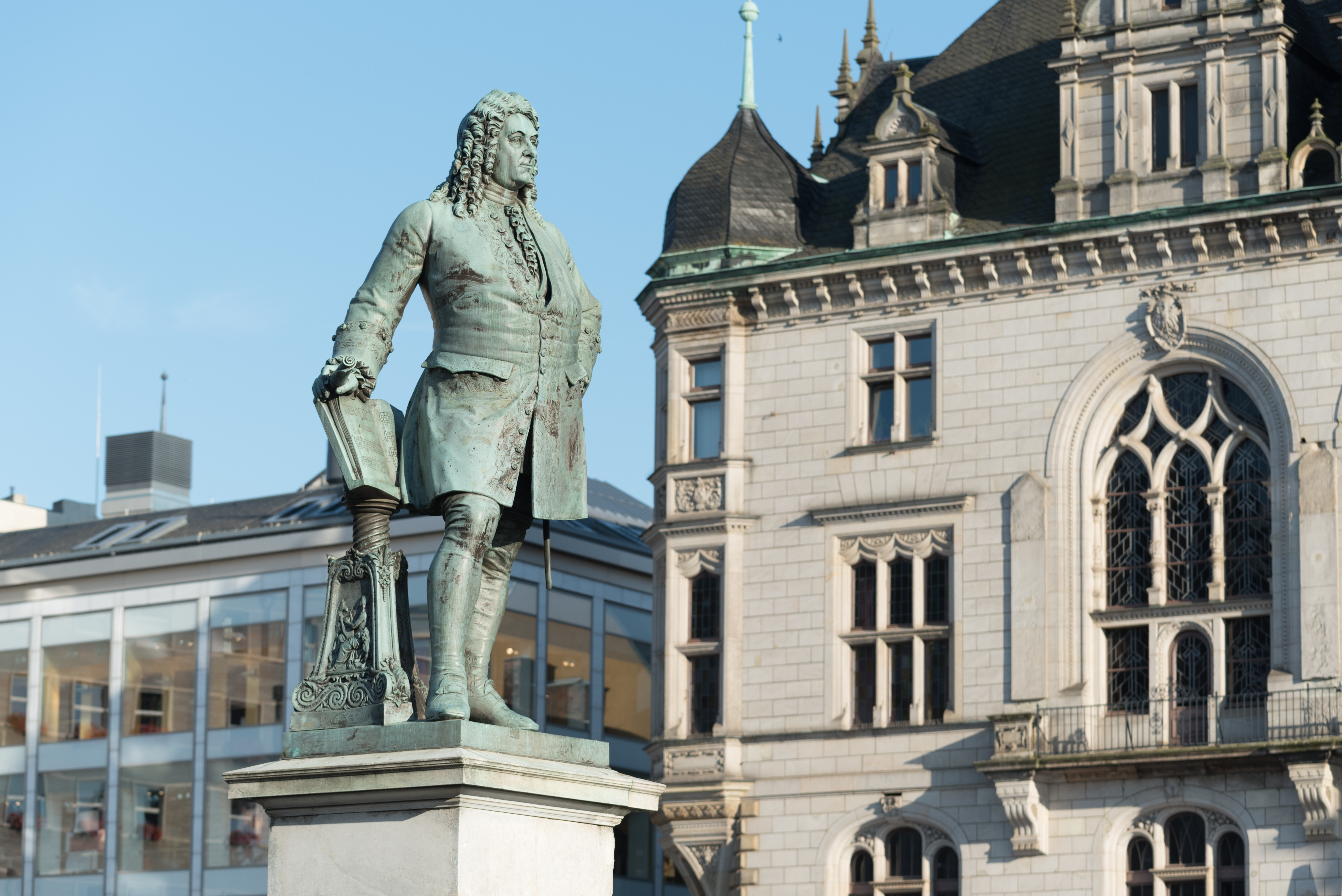 Halle (Saale), Marktplatz, Händeldenkmal